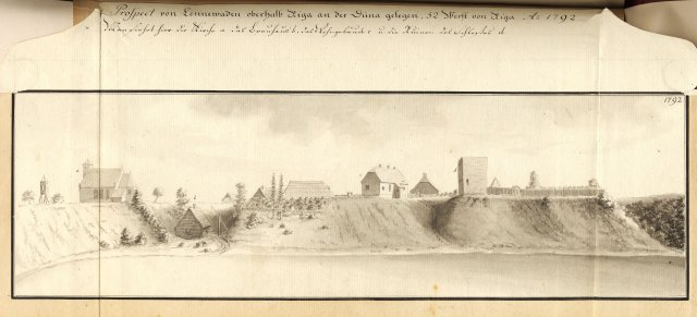 Scan from Johann Christoph Brotze's book Sammlung verschiedner Liefländischer Monumente. Prospect von Lennewaden oberhalb Riga an der Düna gelegen, 52 Werst von Riga Anno 1792 [die Ansicht].